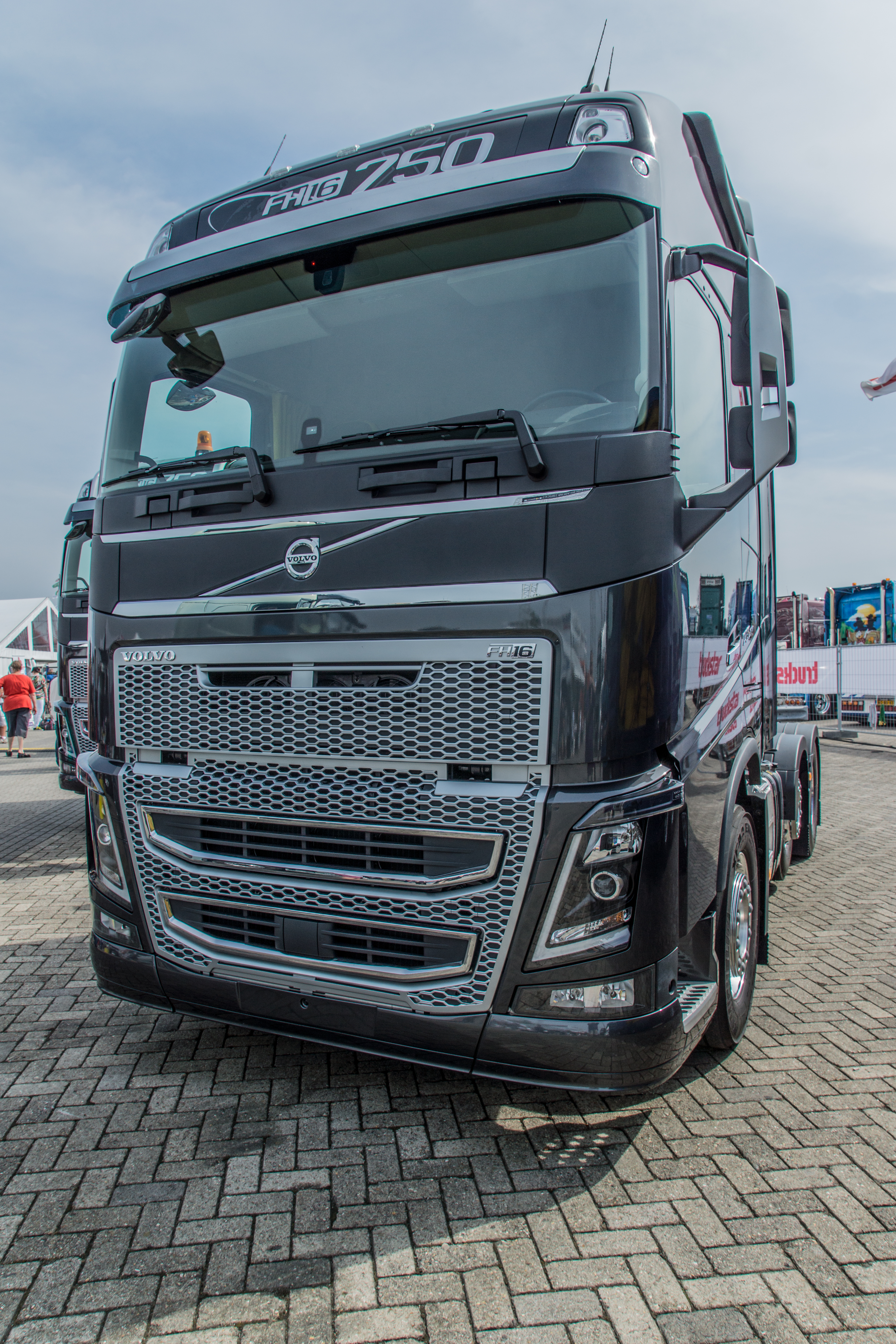 Volvo FH stand Volvo Truckstarfestival Assen